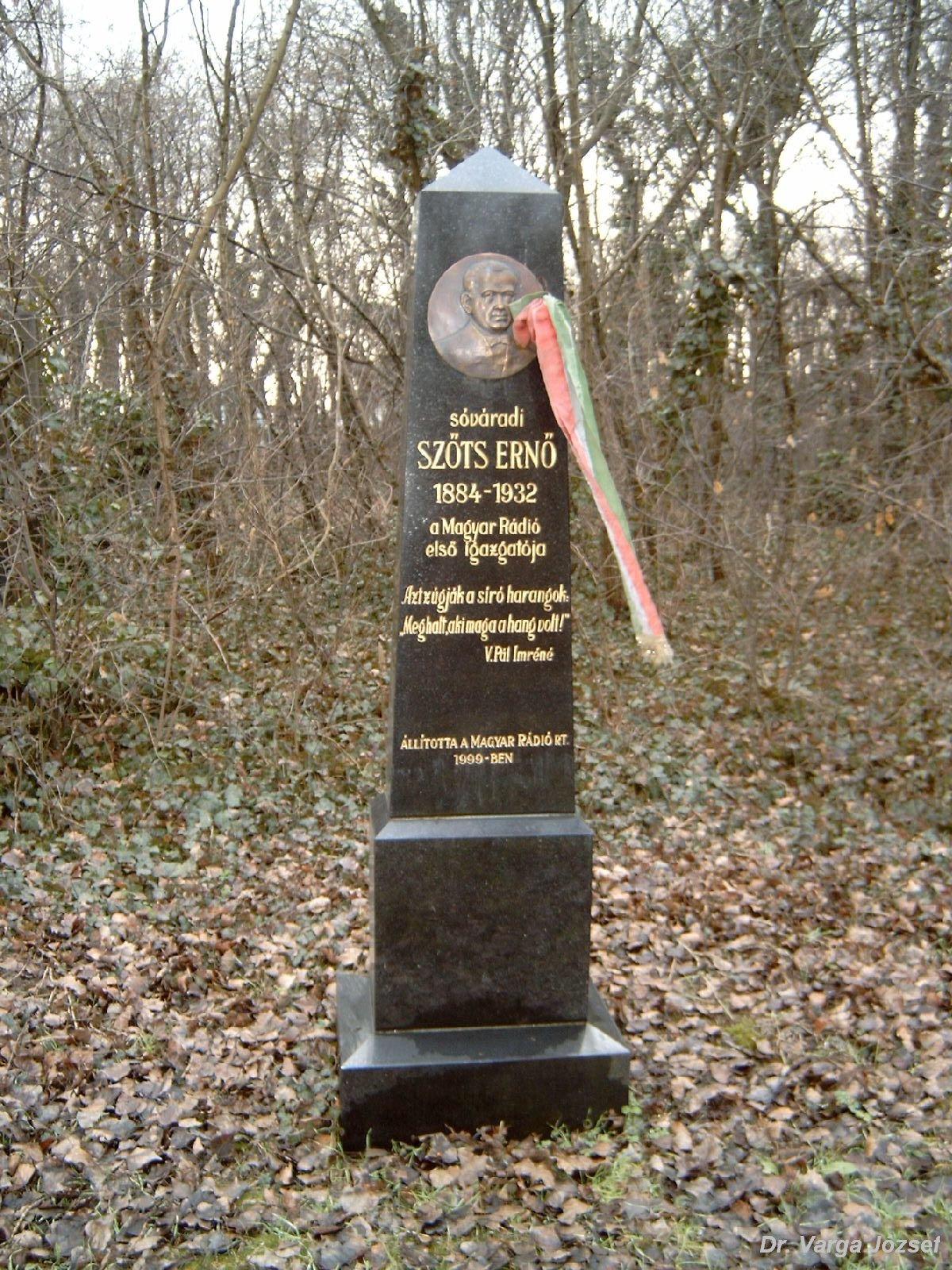 Szőts Ernő (1884-1932) a Magyar Rádió első igazgatójának sírja Budapesten. Kerepesi temető: 47-1-46.